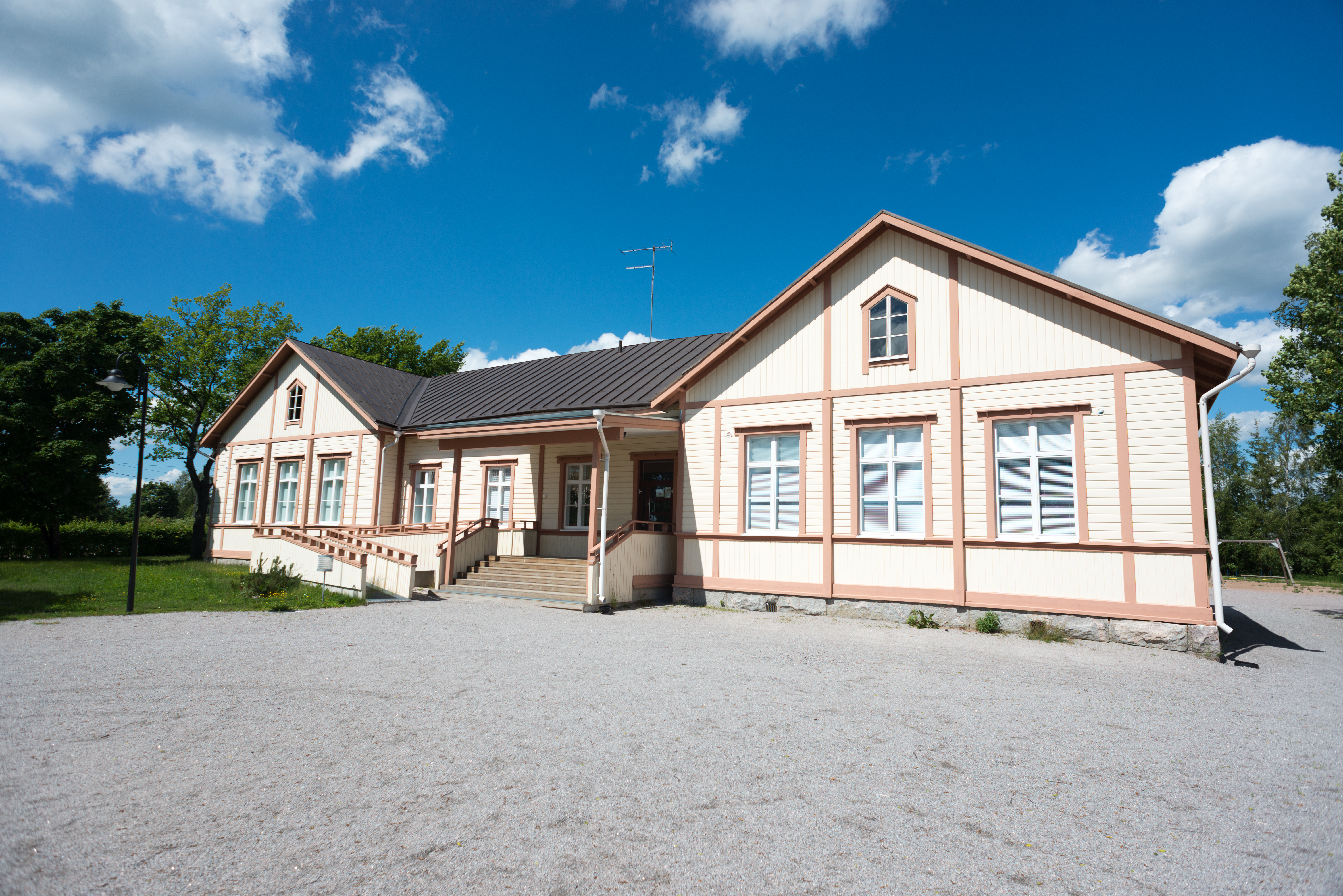 Vaskion koulu Halikossa